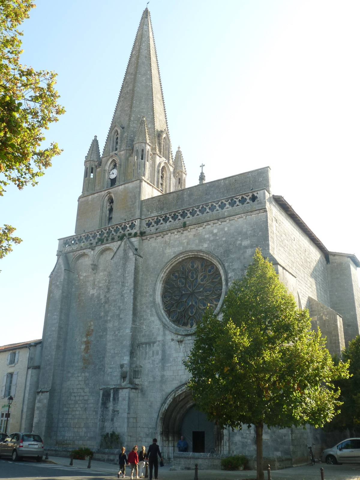 collégiale de la Rochefoucauld (16), France